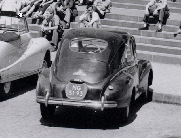 NG-51-93 Peugeot 203